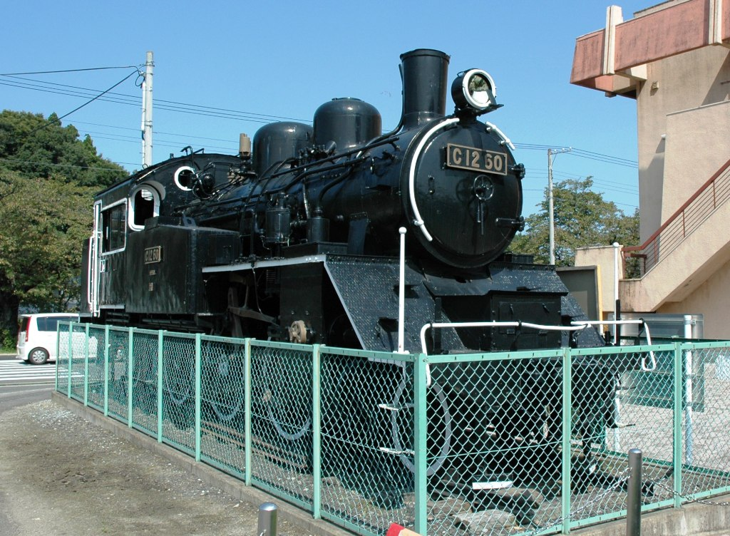 C1260:a japanese steam locomotive,on Iino,japan